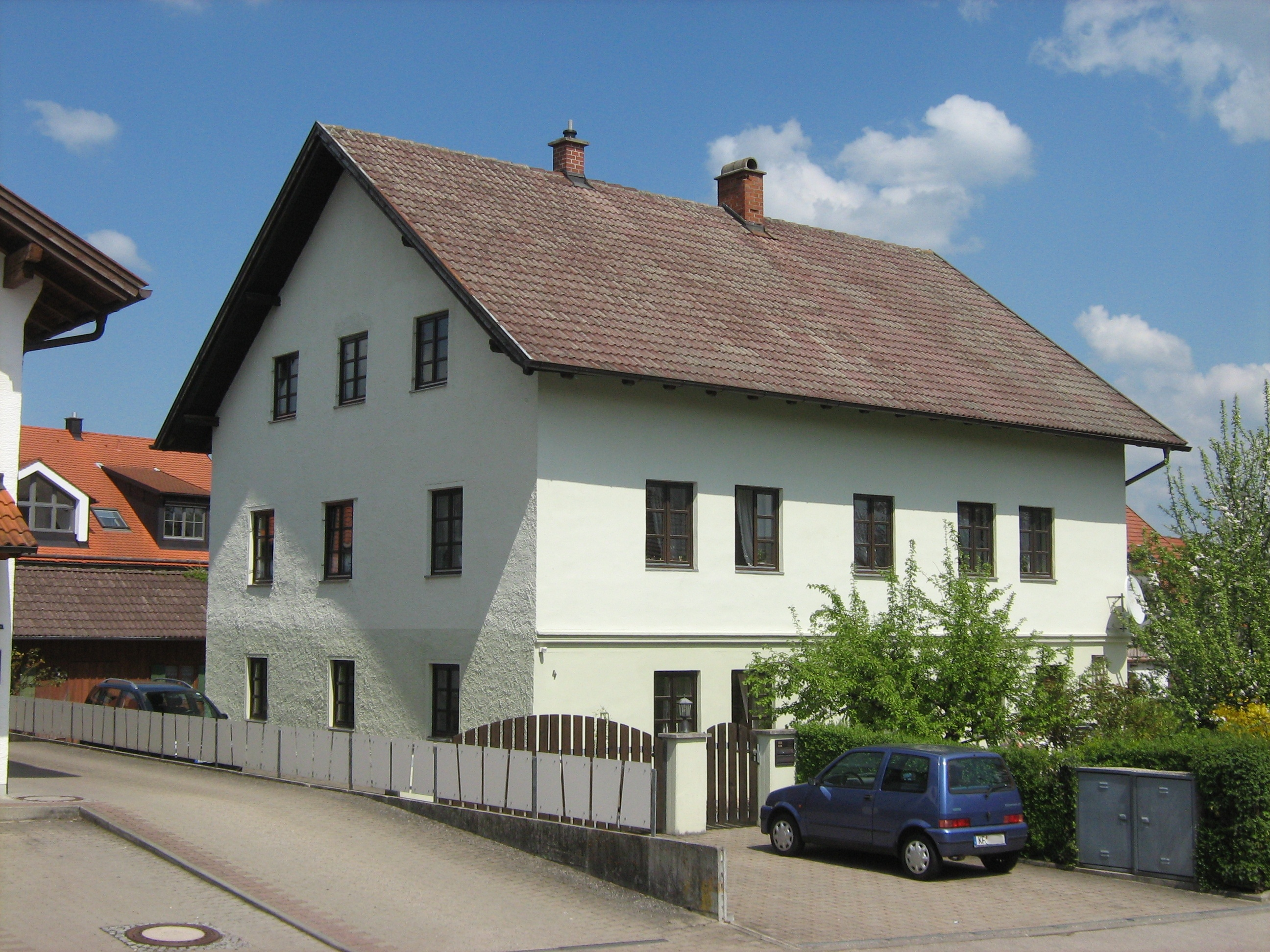 Oberbeuren Am Schloessle